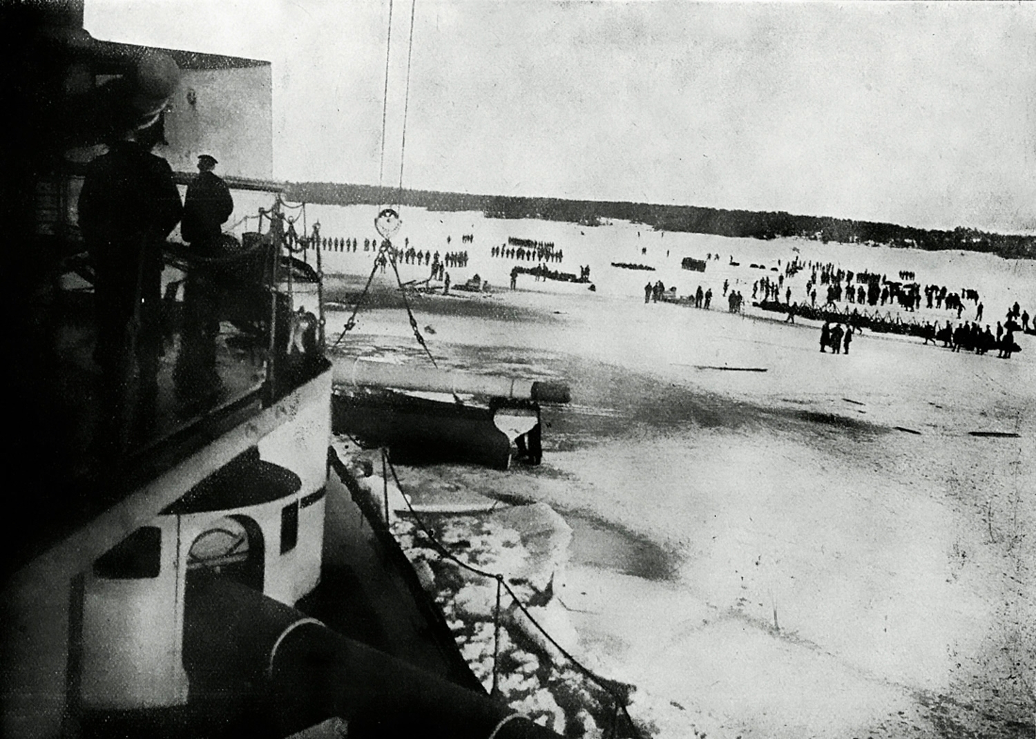 Ankunft der deutschen Linienschiffe vor den Åland-Inseln. Die deutschen Truppen warten auf dem Eis, um nach dem Festland transportiert zu werden.